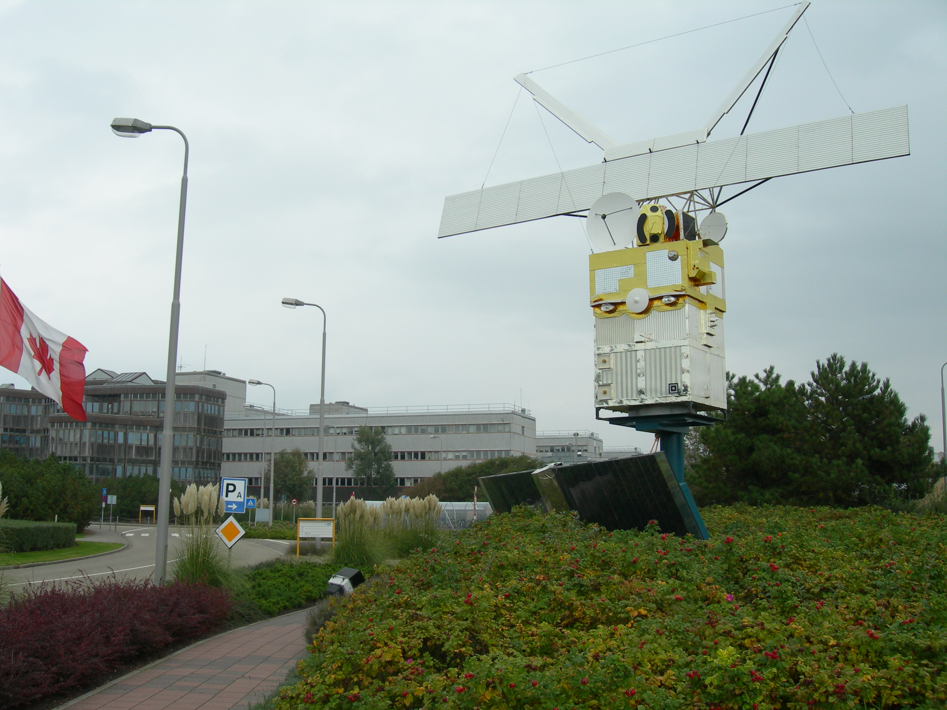 ESA-ESTEC